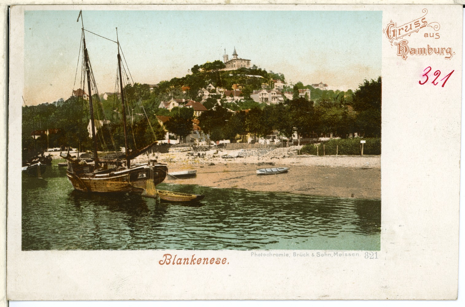 Hamburg; Blankenese This postcard is from publisher Brück & Sohn in Meißen ( This postcard has a unique number 00321 and is available in a higher resolution at the publisher. This images was uploaded in a cooperation project between Wikipedians and the publisher.